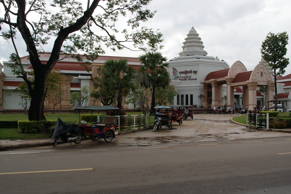 Siem Reap Angkor National Museum